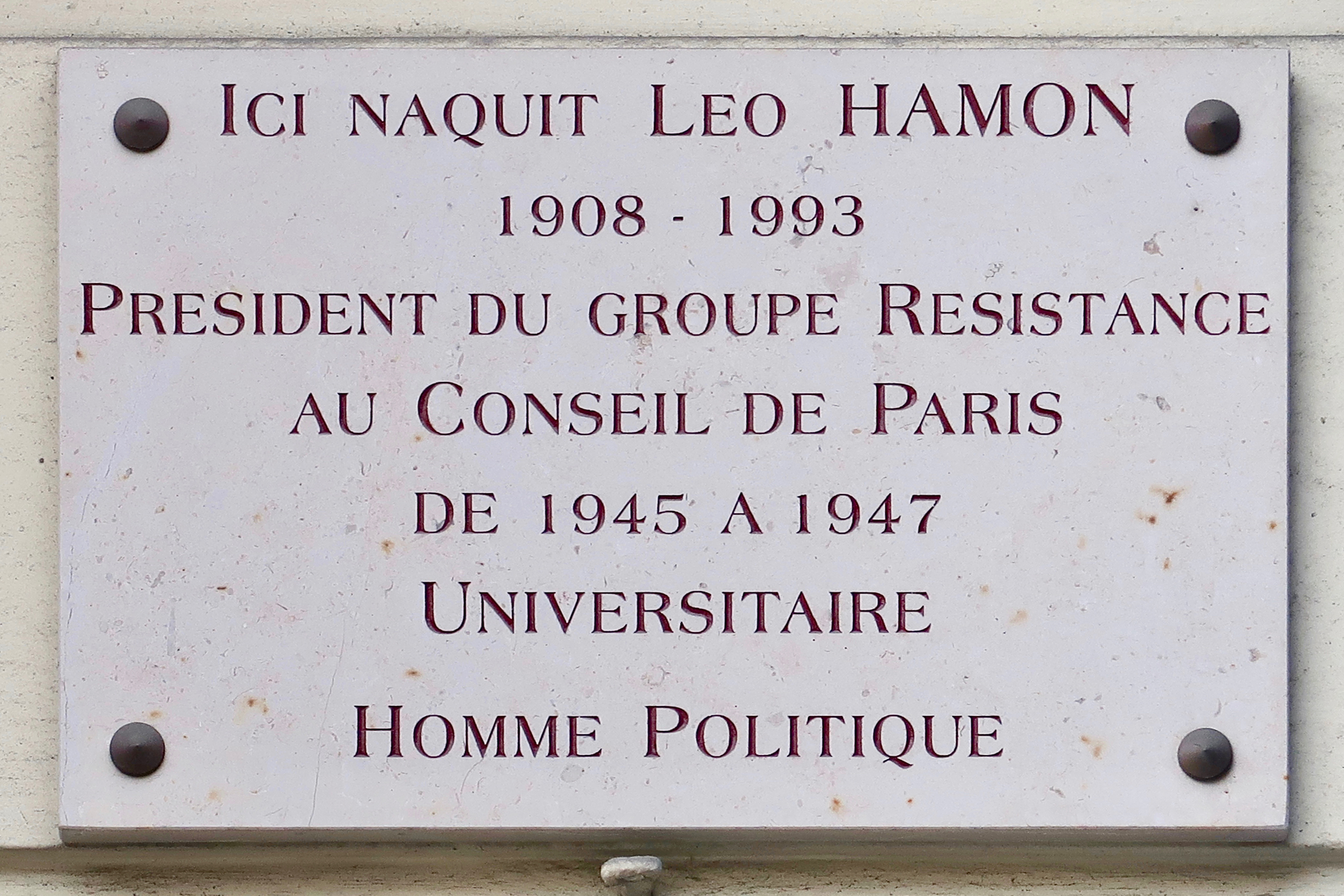 Plaque en hommage à Léo Hamon, 39 boulevard de Port-Royal (Paris, 13e).